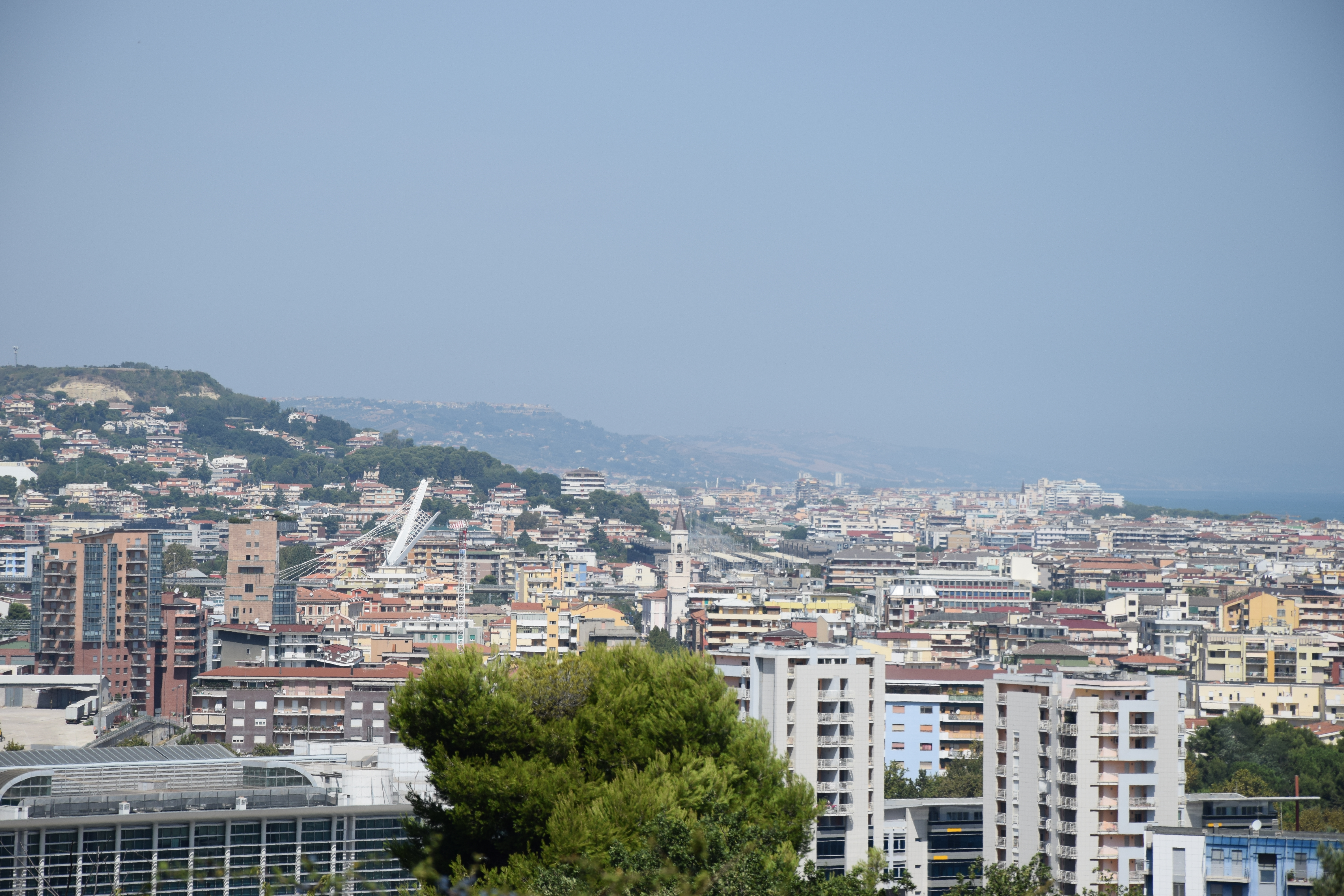 Pescara vista da Colle Falcone